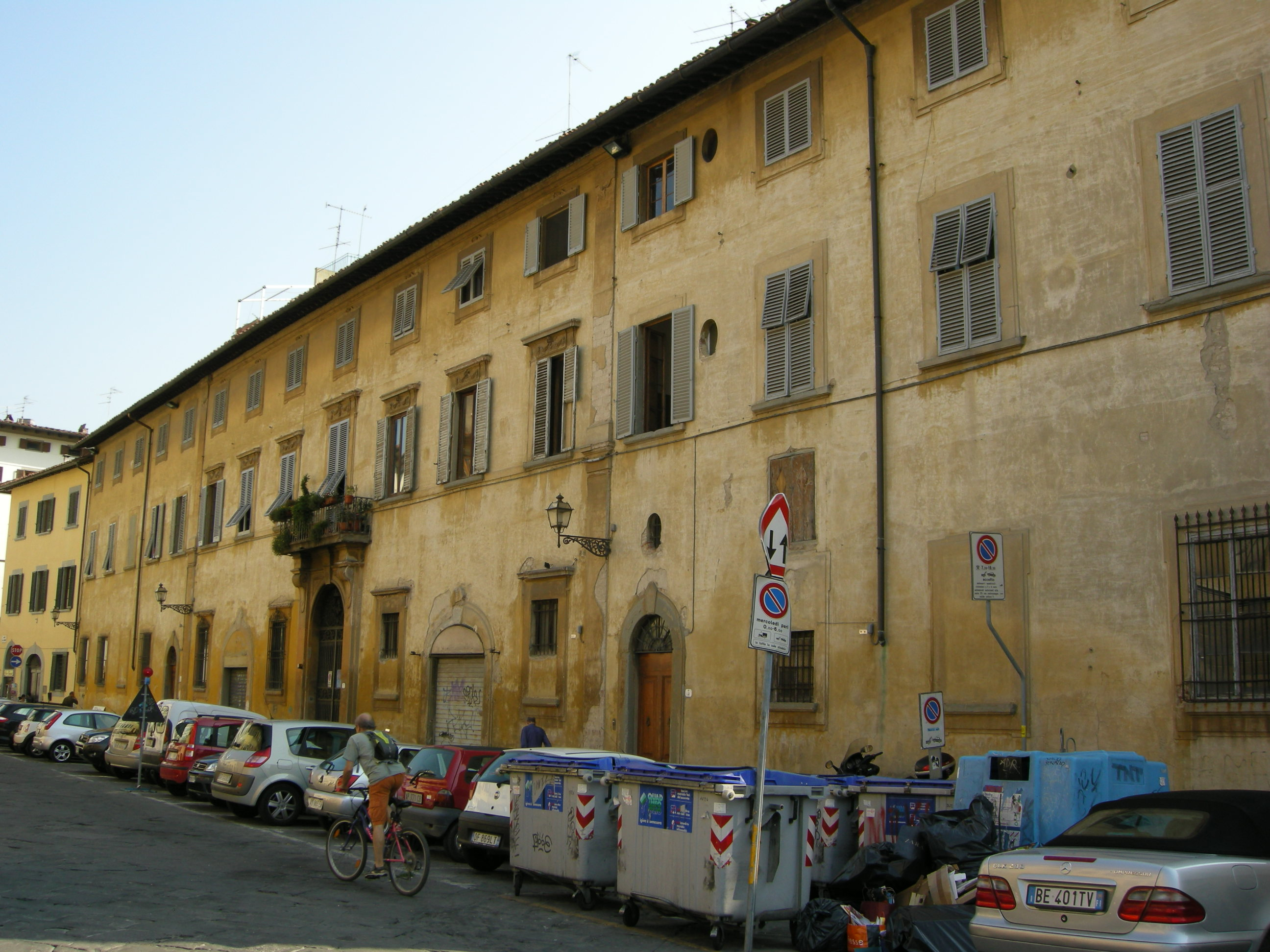 Palazzo Del Pugliese su piazza del carmine